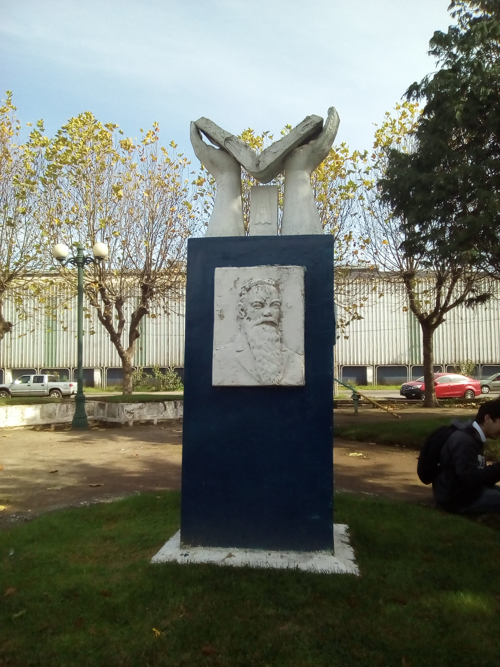 Monumento al precursor de los Protestantes de Chile, Ubicado en una plaza de Coronel, VII Región Chile